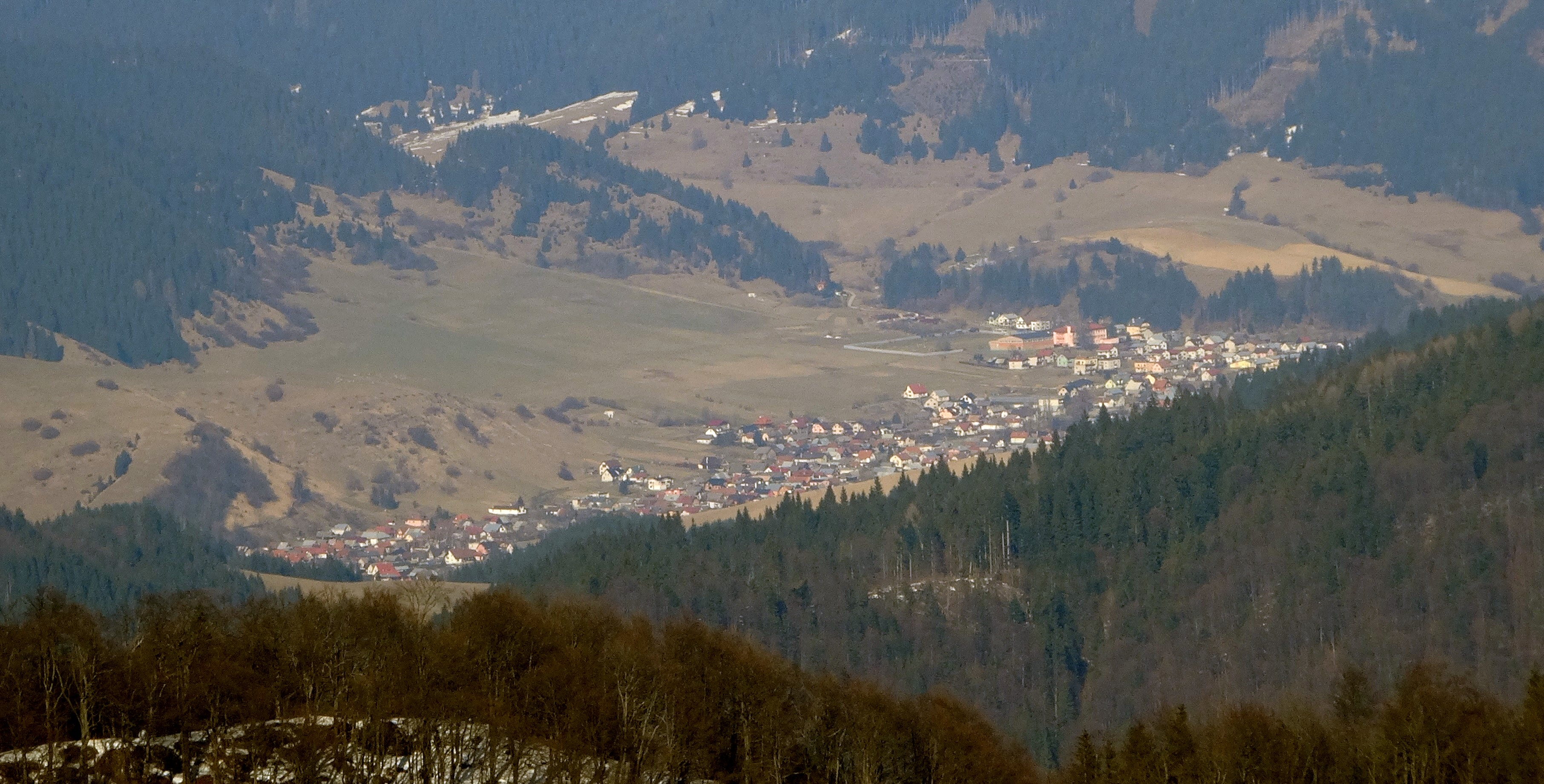 Lipt. Revúce z Novej hole